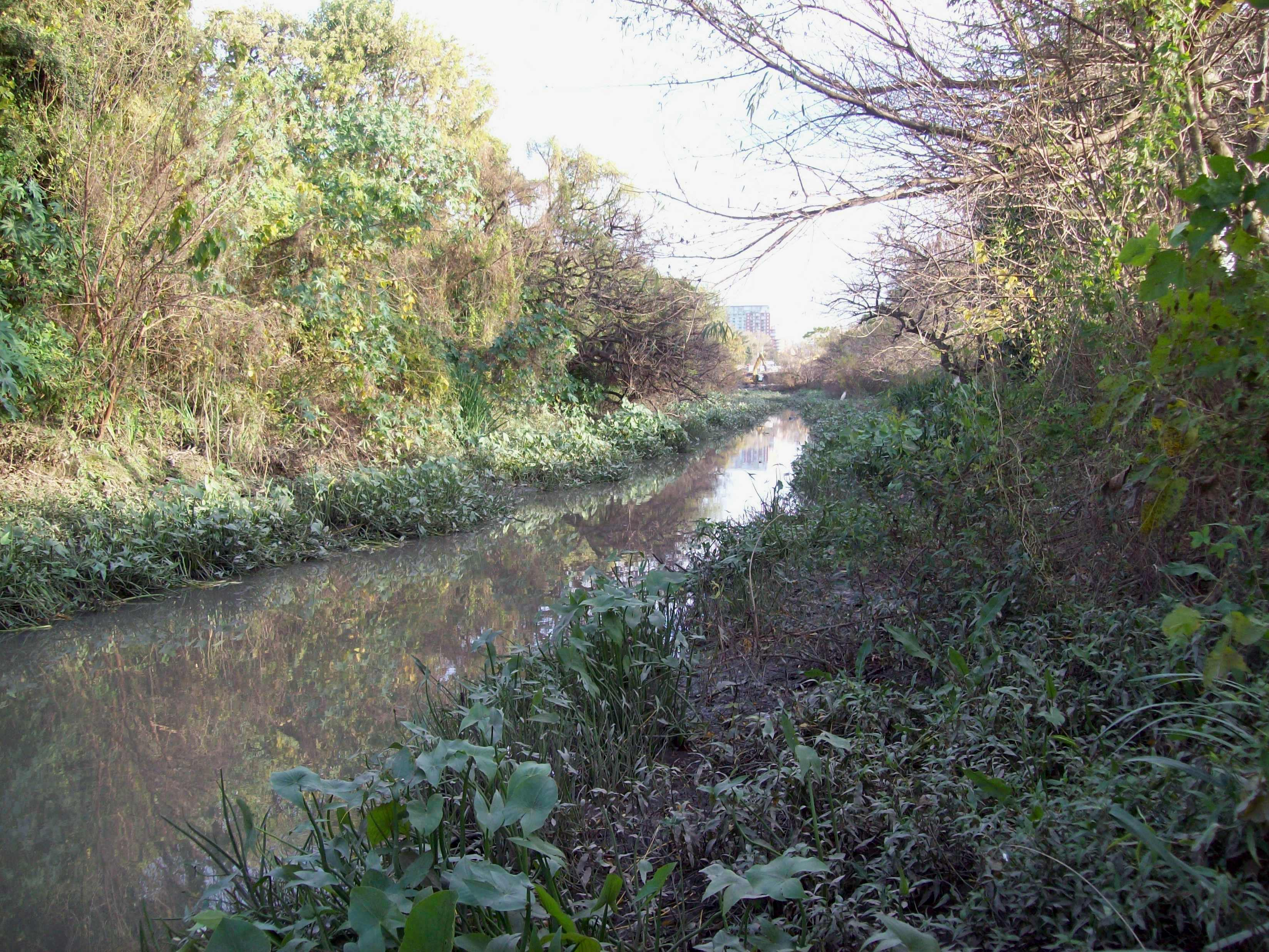 El arroyo Raggio, frontera entre la Ciudad Autónoma de Buenos Aires y la provincia de Buenos Aires, en el centro-este de la Argentina.